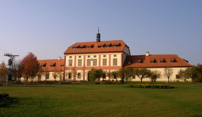 Průčelí hospodářského dvora Býkov se znaky dvou opatů cisterciáckého kláštera v Plasech. Datum: 30. listopadu 2005